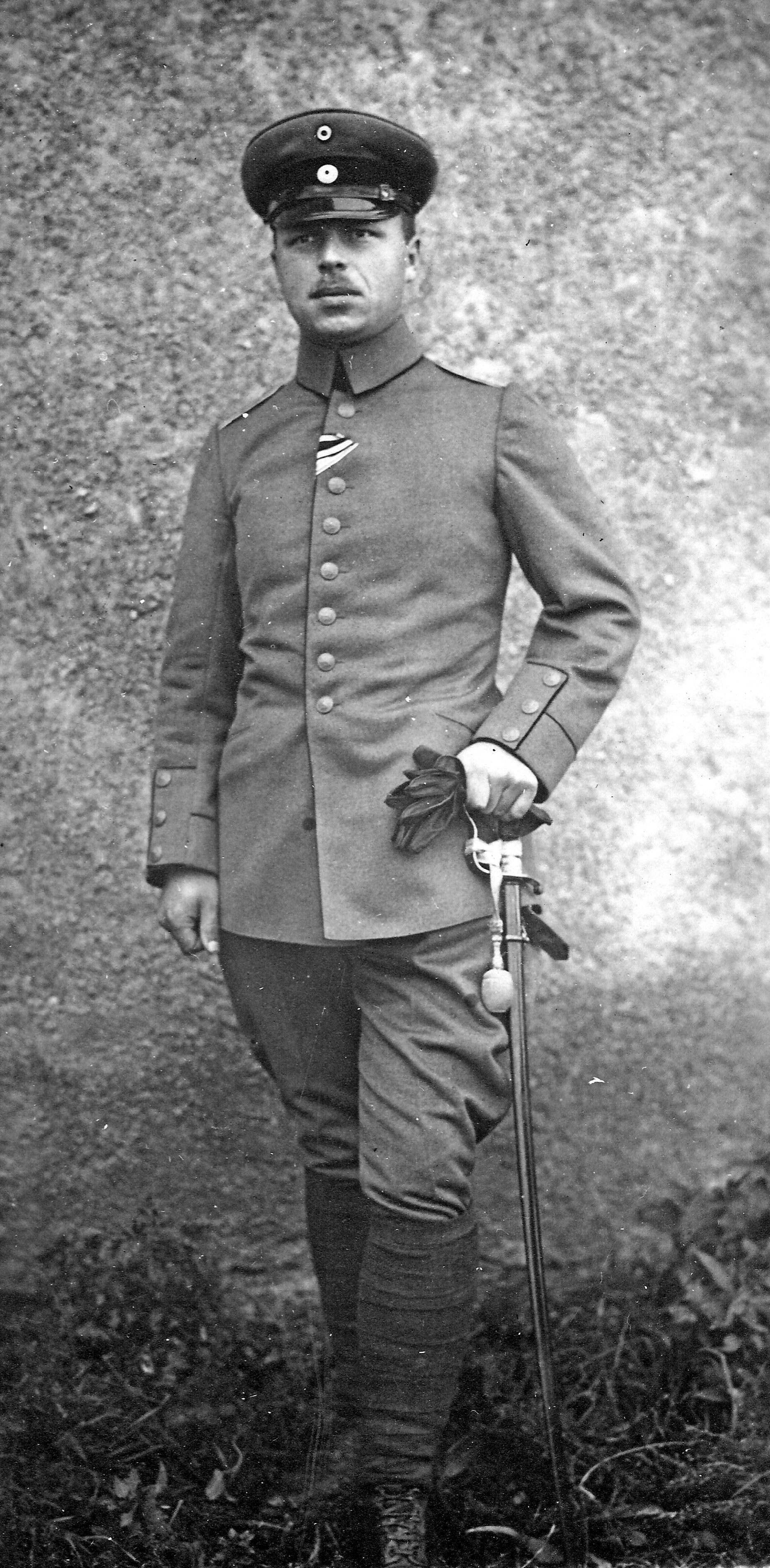 Franz Dischinger als Leutnant im Ersten Weltkrieg